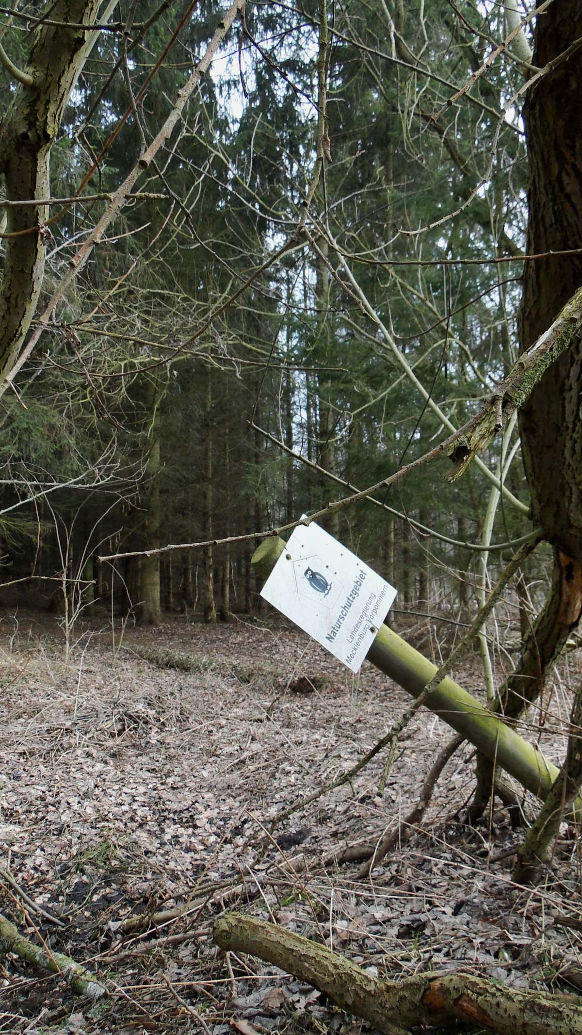 Südliche Grenze Teufelsmoor bei Horst, Mecklenburg-Vorpommern.